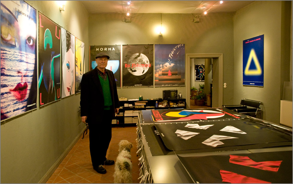 Gunter Rambow in seinem Haus in Güstrow